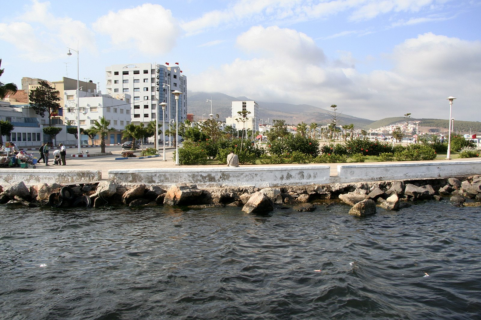 Paseo Marítimo de Nador